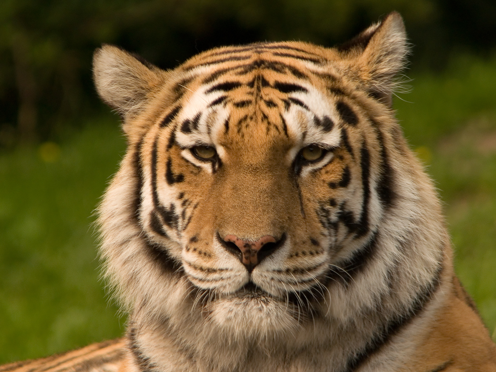 Siberian Tiger